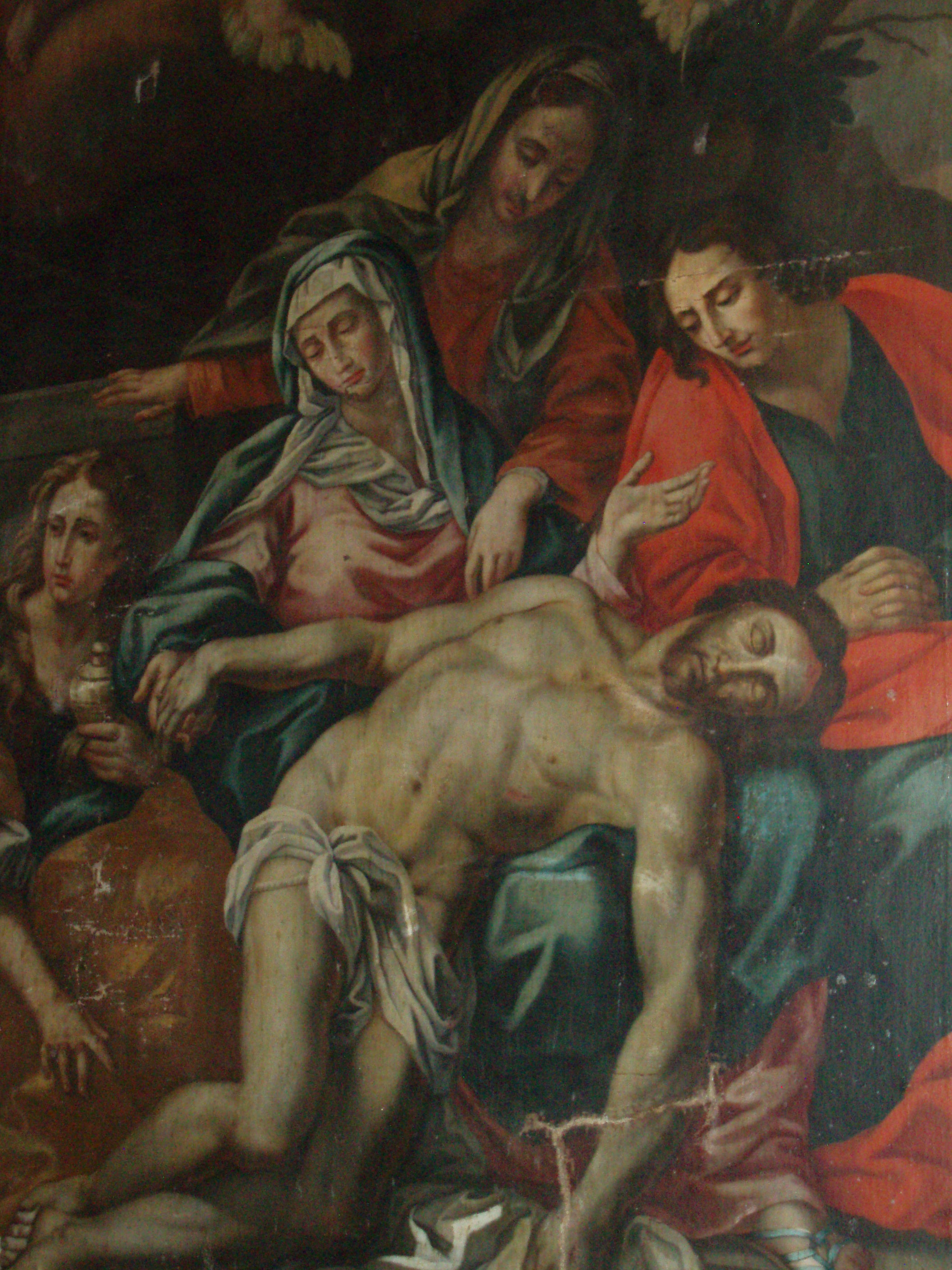 Altar painting